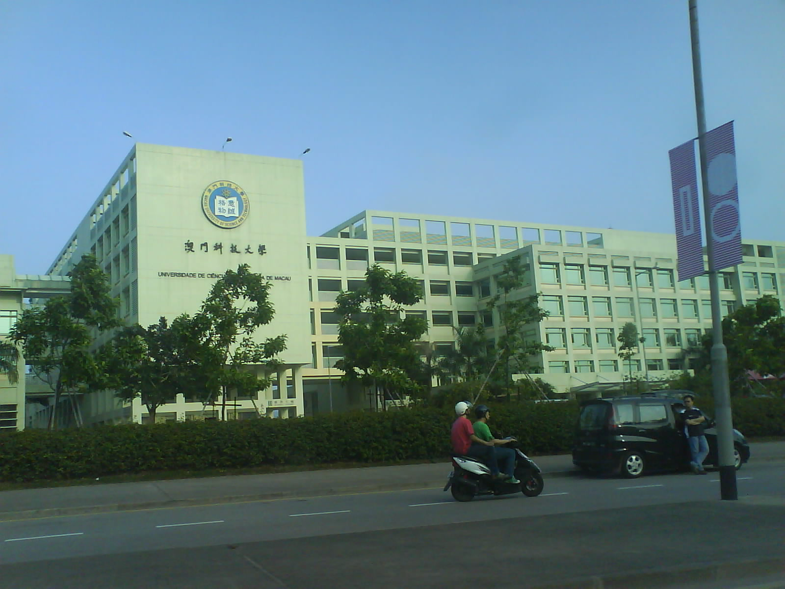 澳門科技大學